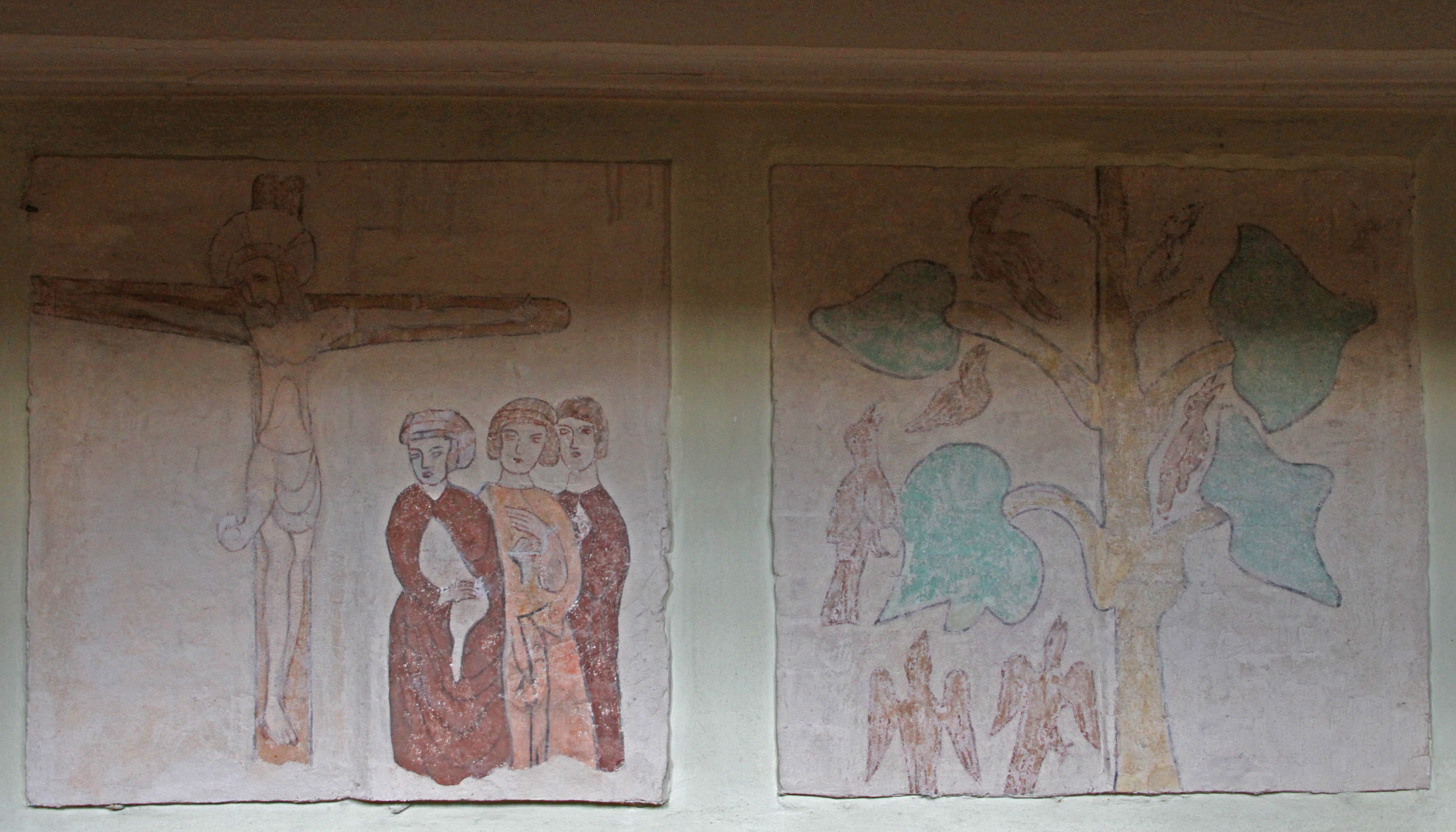 Protestantische Christuskirche in Rumbach/Pfalz.